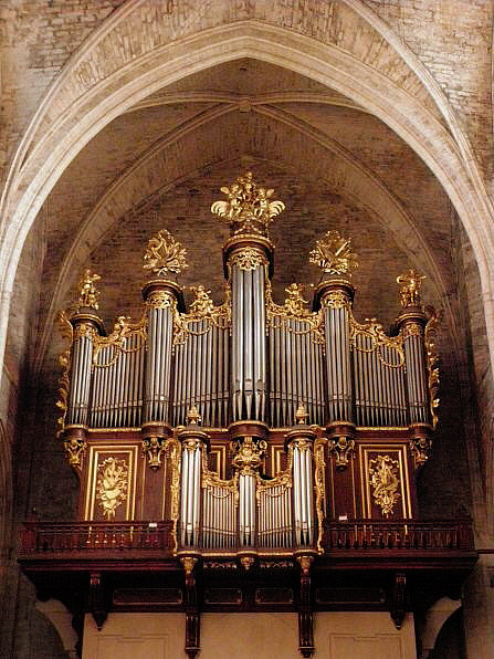 Grandes-Orgues de la cathédrale Saint-Pierre de Montpellier (34).